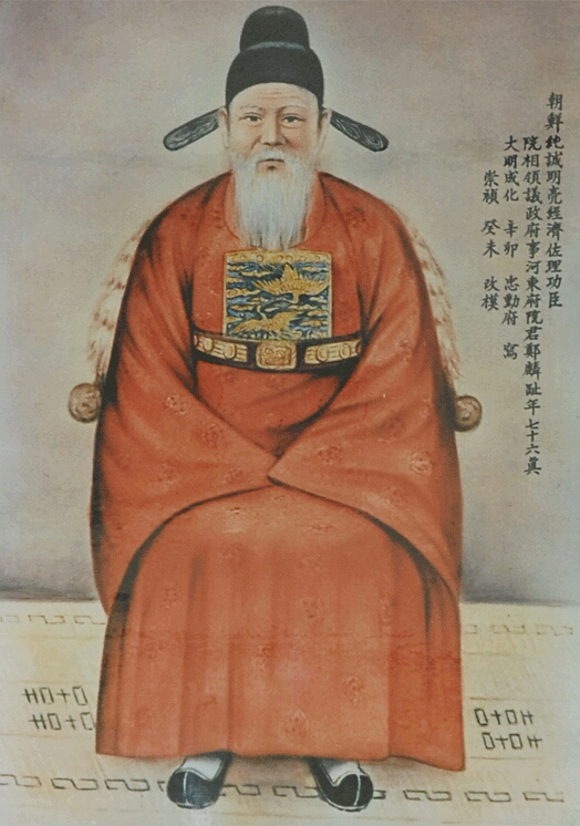 文成公學易齋鄭麟趾象